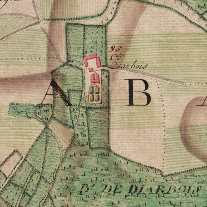 Jumet (Charleroi-Belgique), château de Diarbois vers 1775. Actuellement parc de la Serna. Carte de Cabinet des Pays-Bas autrichiens La carte de Cabinet des Pays-Bas autrichiens a été levée sous la direction du comte de Ferraris entre 1770 et 1777. Il s'agit d'un document militaire réalisé en trois exemplaires et dont l'échelle originale est 1 / 11 520. La carte est entièrement manuscrite et procède de levers sur le terrain.